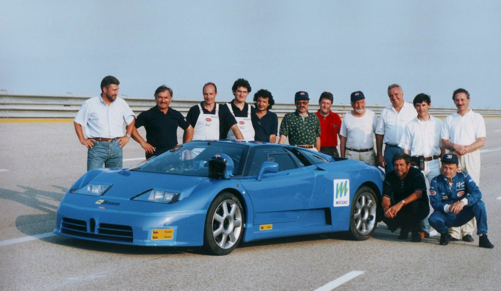 La Bugatti EB110 che stabilì il record di velocità per autovetture a metano. In basso a destra è possibile notare il pilota collaudatore Loris Bicocchi. La foto è stata scattata il 2 luglio 1994 sulla pista di Nardò dopo aver stabilito il record.